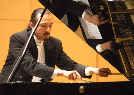 Ejecutando Intento1 para piano de Víctor M. Medeles en Beijing.